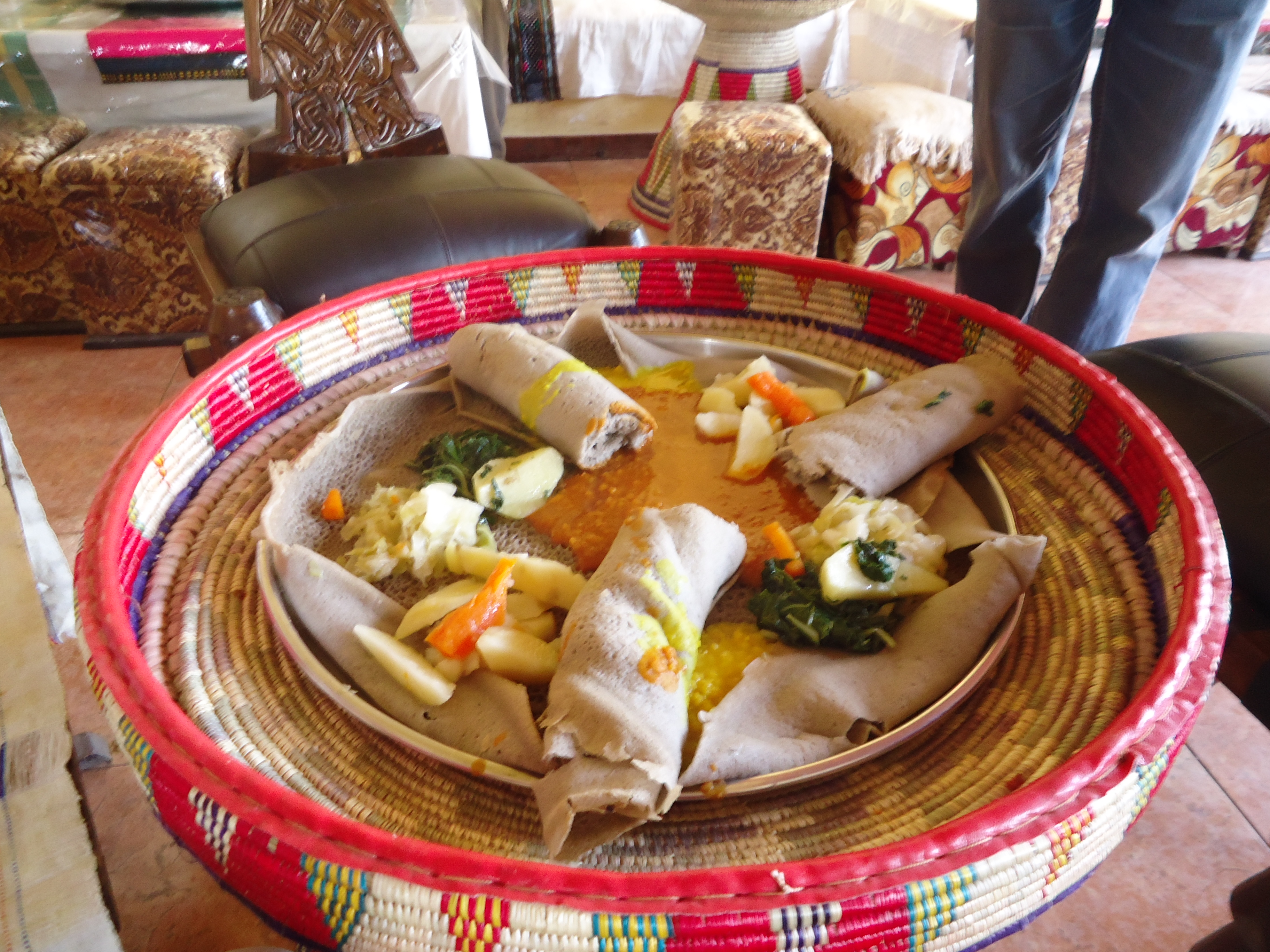 Äthiopisches Fastenessen: Shiro, Mesir Wot, Spinat, Kartoffeln, Karotten, Weißkraut mit Injera. Auch Heiligabend (in der Orthodoxie der 6.1.) ist ein Fastentag. Aufnahme am 6. Jan 13 in Lalibela